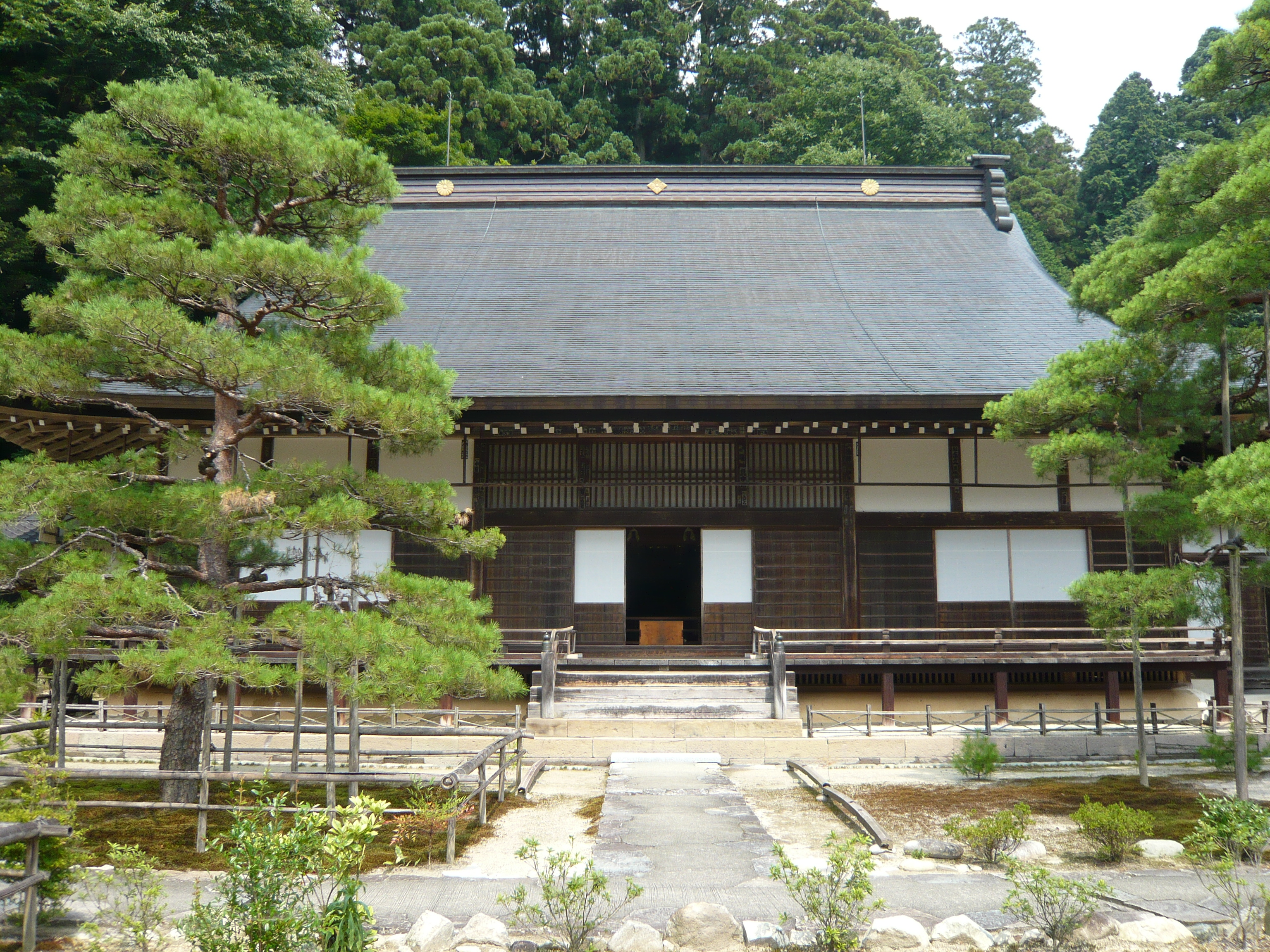 下呂市萩原町中呂の禅昌寺。本堂。